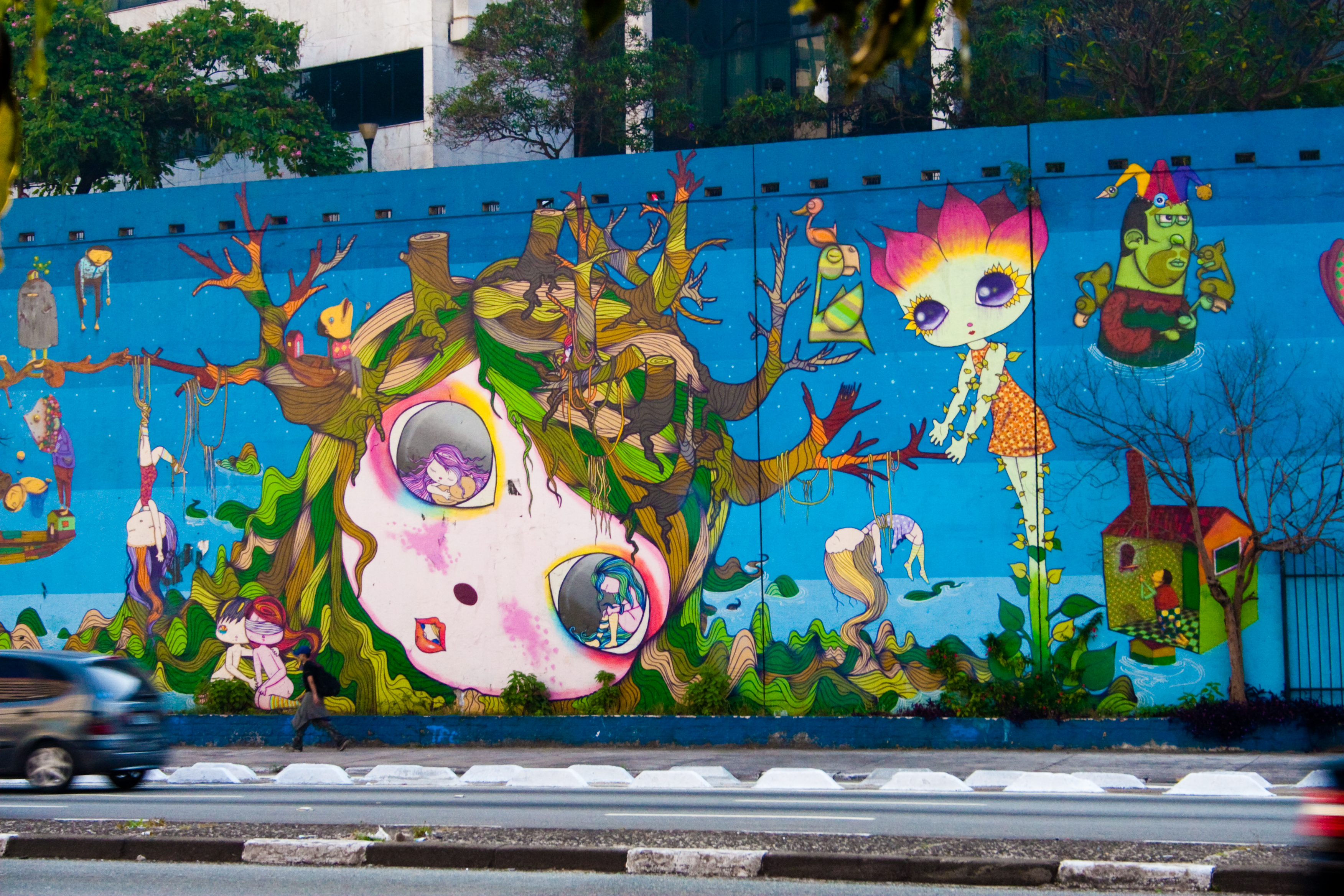 Acesso à Avenida 23 de Maio, Bela Vista. Foto por André Deak para o Arte Fora do Museu (